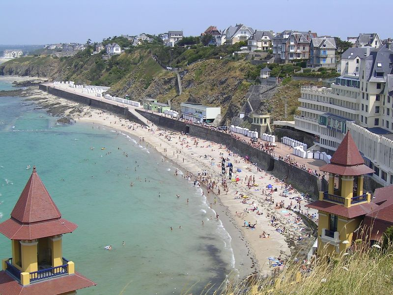 La plage de Granville (France)